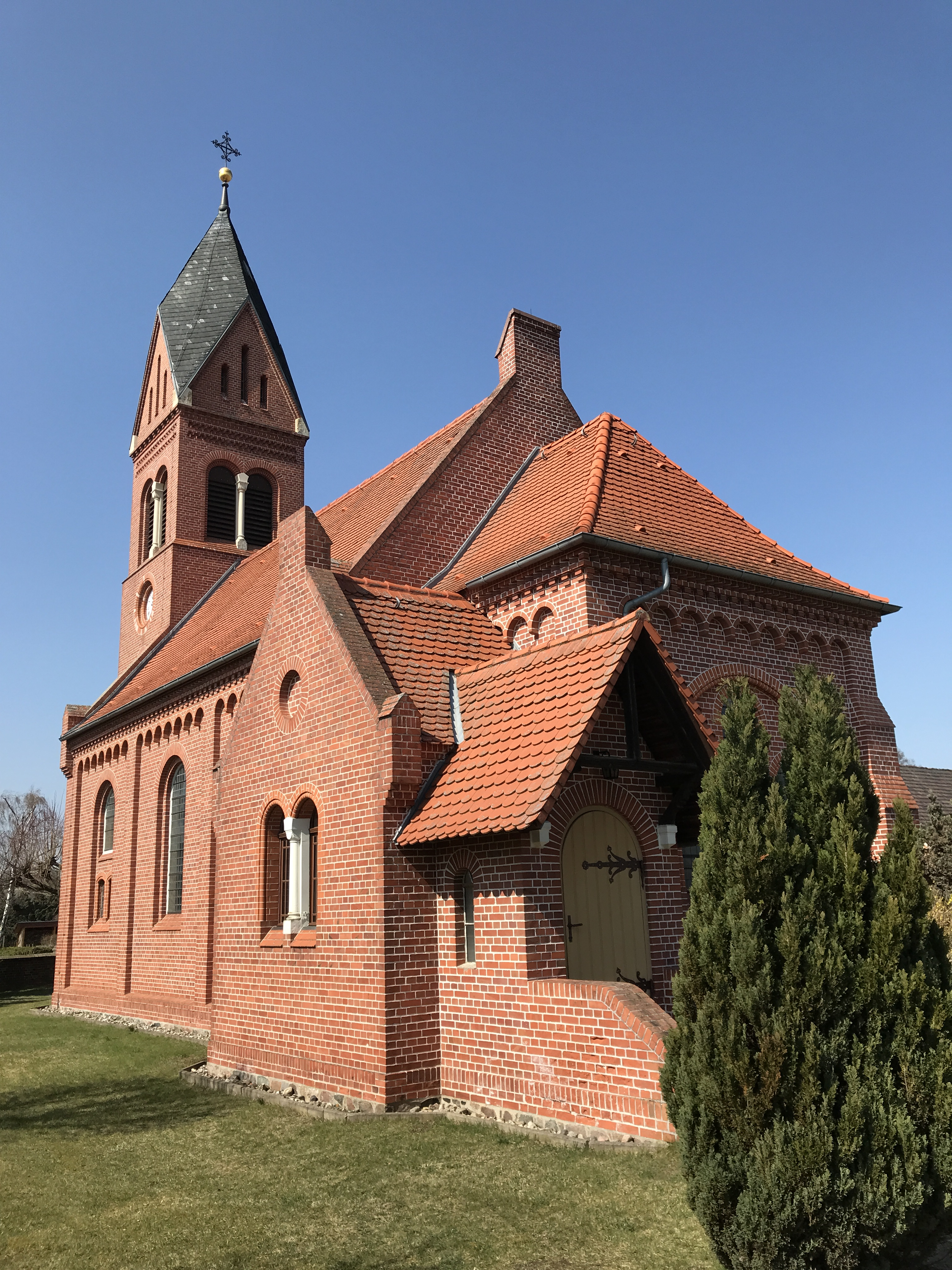 Die Dorfkirche in Münchhausen der Gemeinde Sonnewalde wurde im Jahr 1895 erbaut. Im Innern befindet sich eine bauzeitliche Kirchenausstattung.